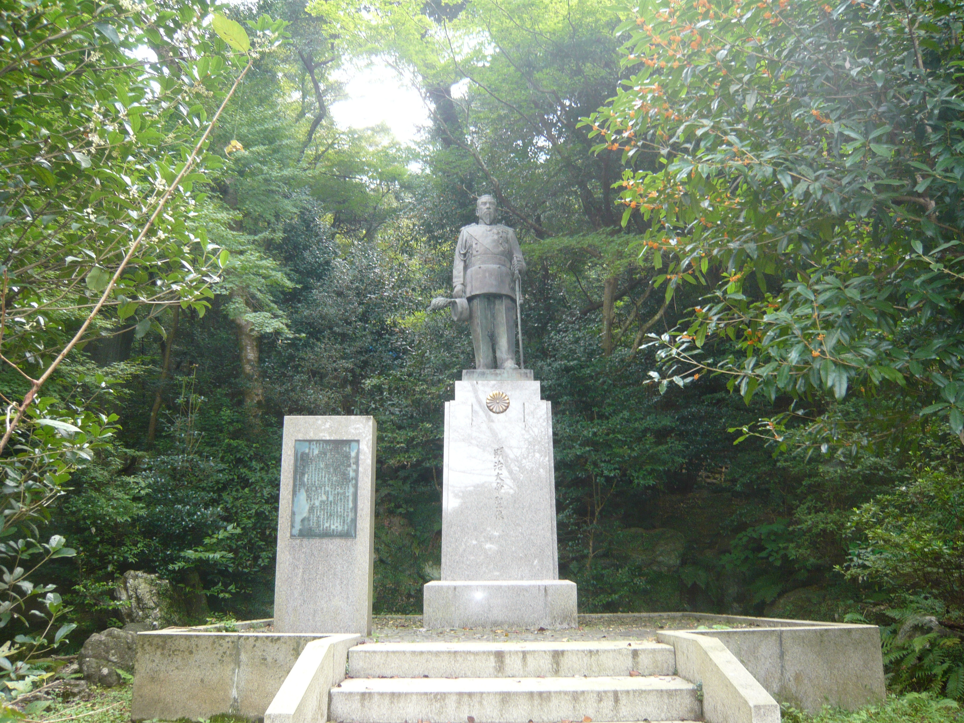 Gifu Park 明治天皇の聖像（岐阜公園）,Gifu,Gifu,Japan（岐阜県岐阜市）で撮影。